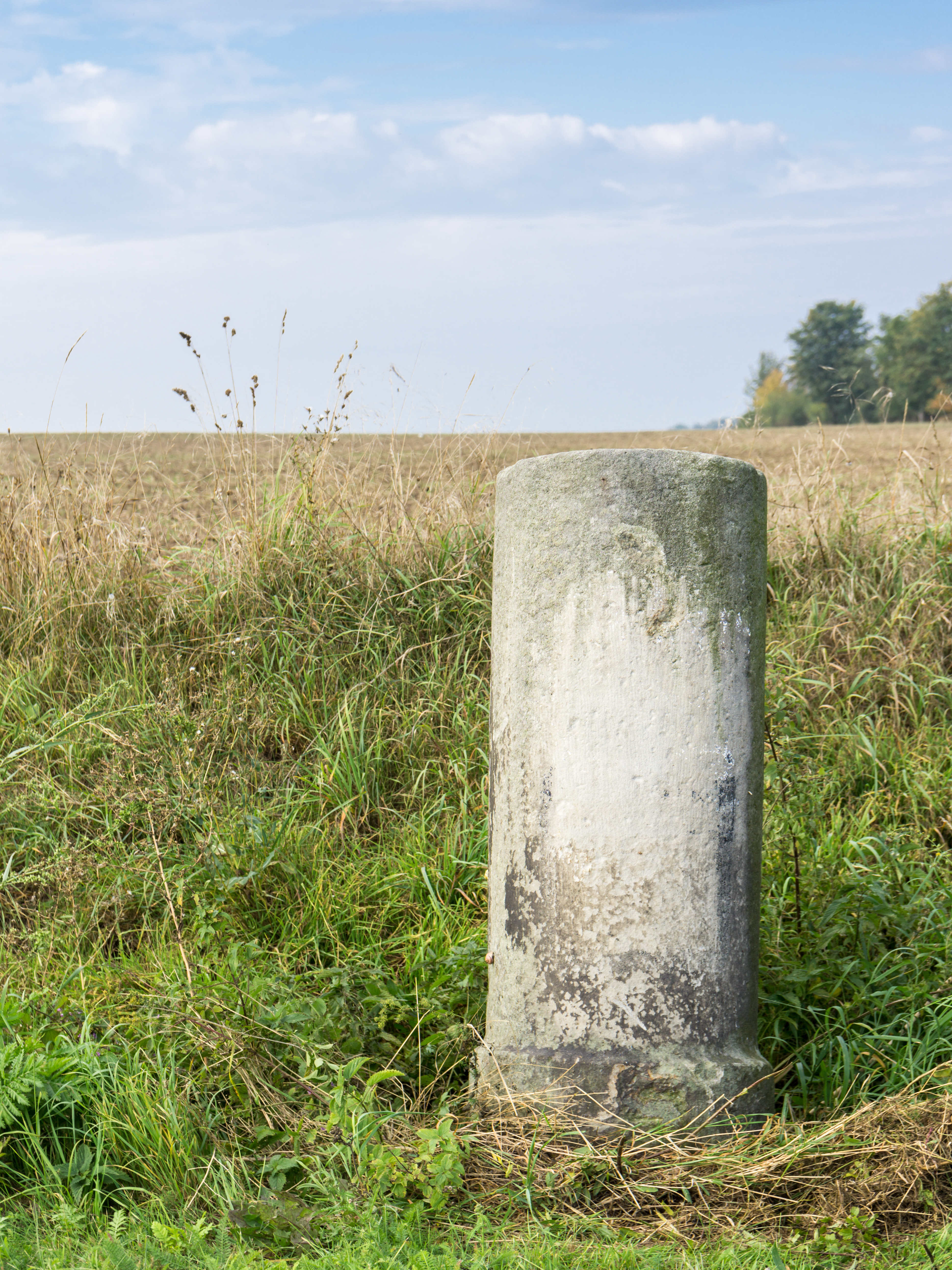 Anhaltischer Meilenstein (0682) an der L 72 südlich von Warmsdorf in Giersleben